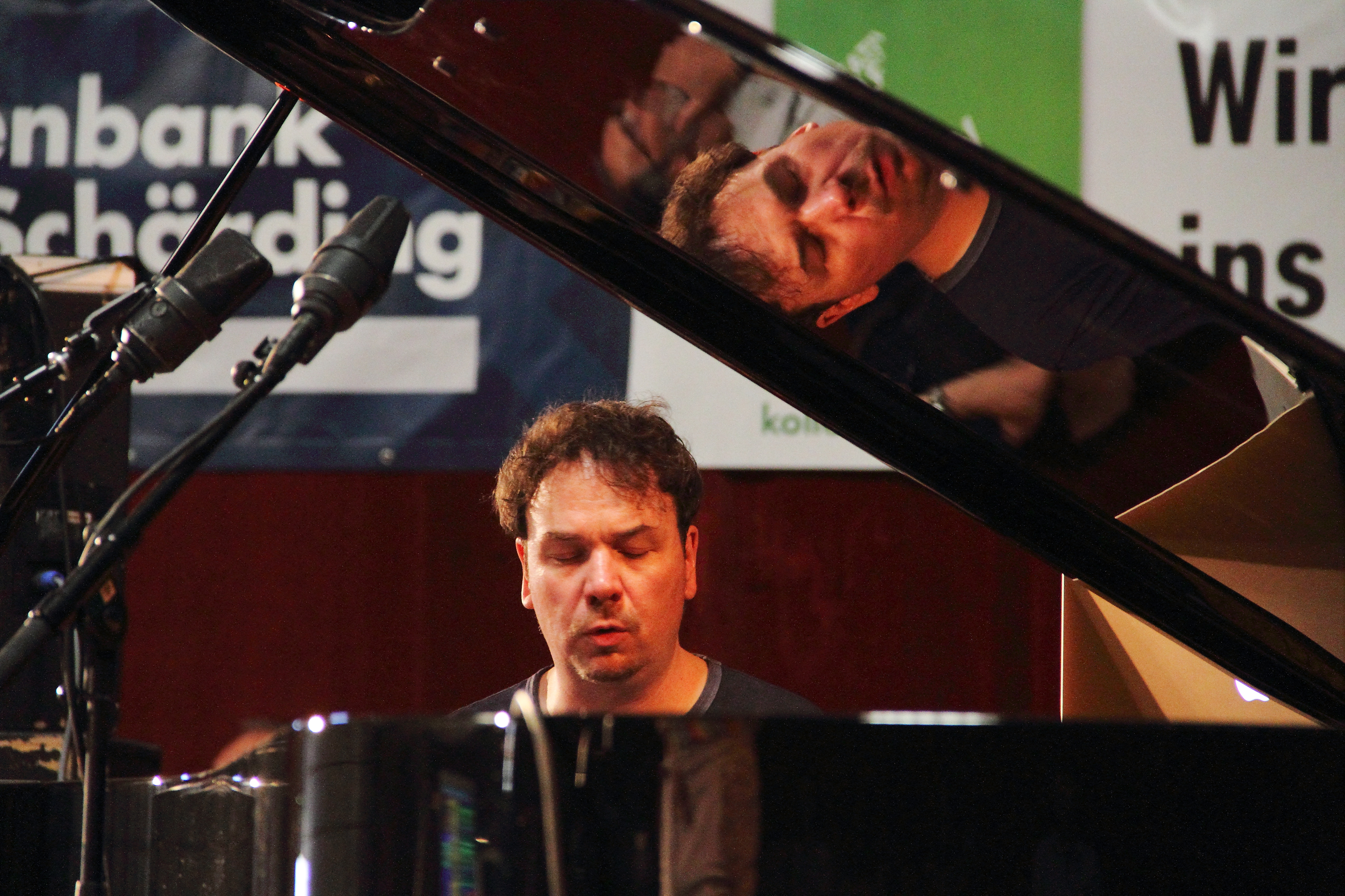 Markus Stockhausen und Florian Weber mit ihrem Projekt INSIDE OUT auf dem INNtöne Jazzfestival 2017.